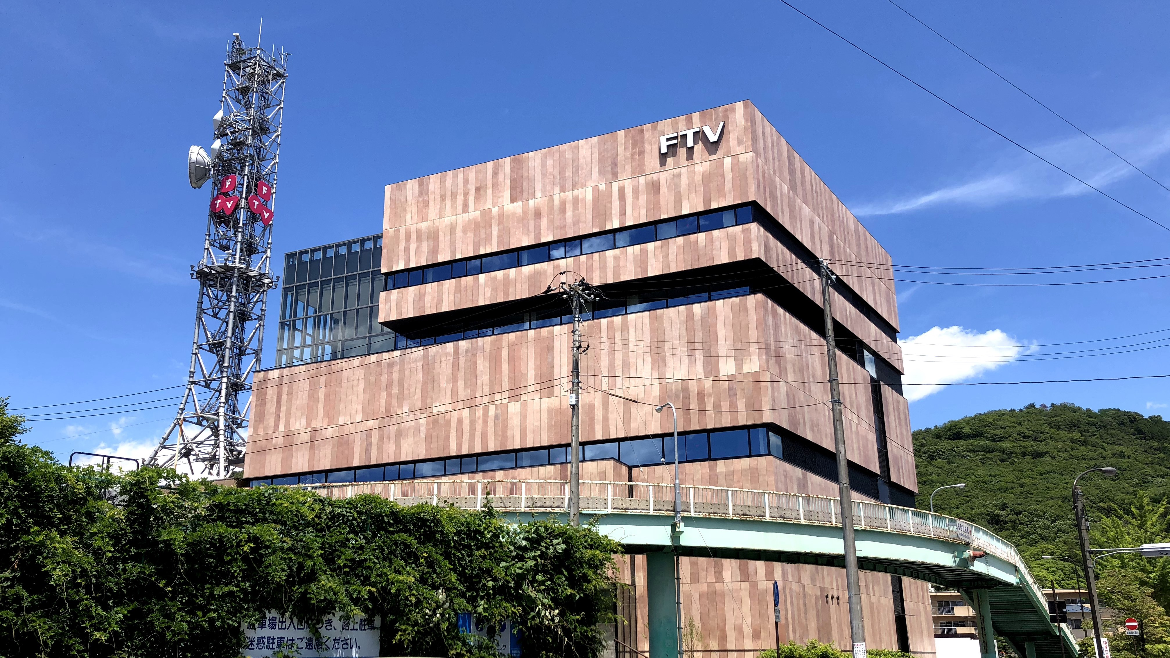 福島県福島市に本社を置く福島テレビの社屋